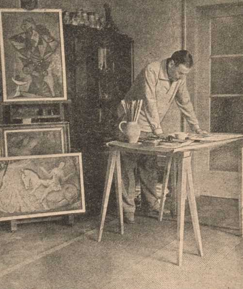 Stanilav Šturz (1908-2001), český malíř a středoškolský pedagog